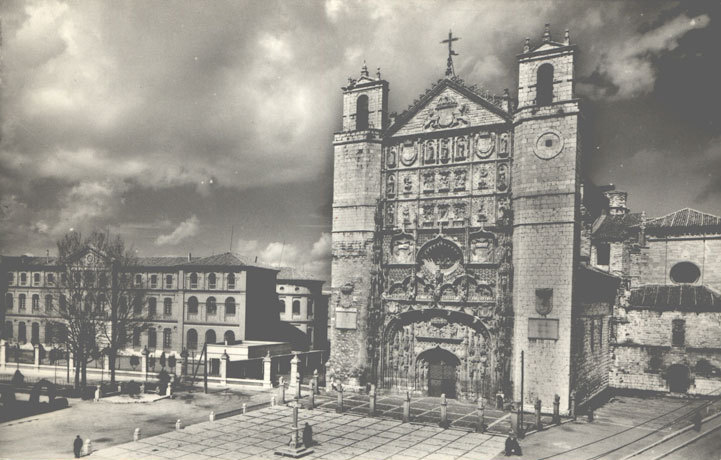 Iglesia de San Pablo. Fachada - Valladolid - POSTAL MADRID. FISA. Nº 41. Valladolid. Iglesia de San Pablo con instituto Zorrilla a la izquierda. - Tarjeta postal. Papel 137 x 88 mm B/N